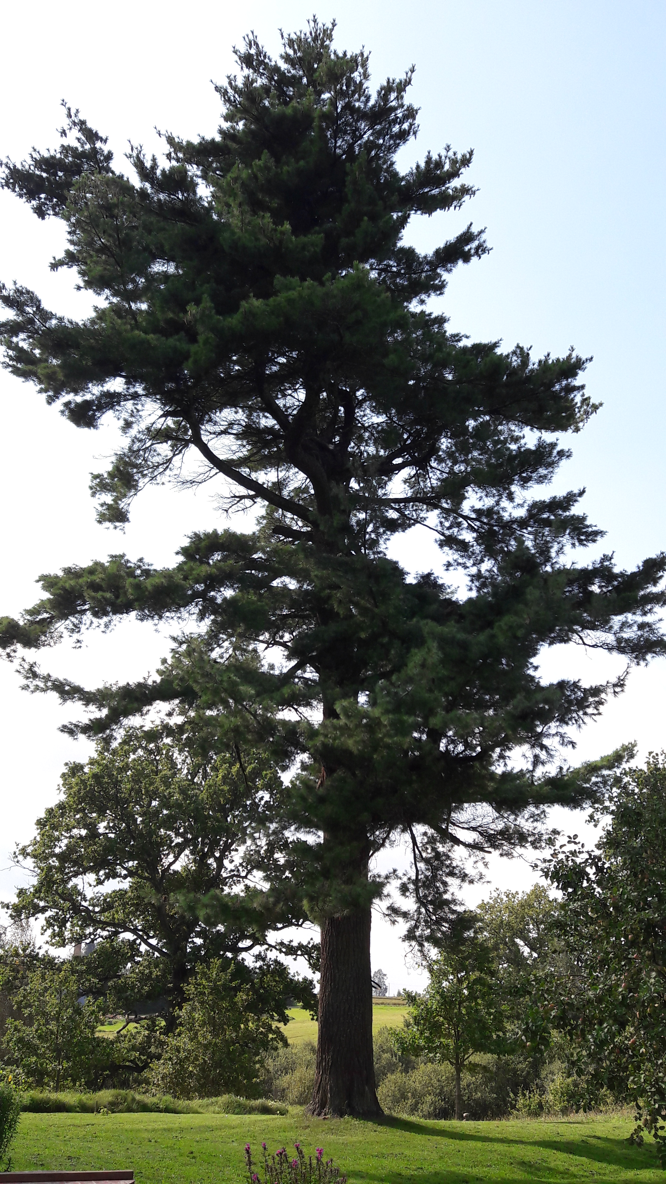 Valge mänd Pedajamäe talu maal Kuigatsis